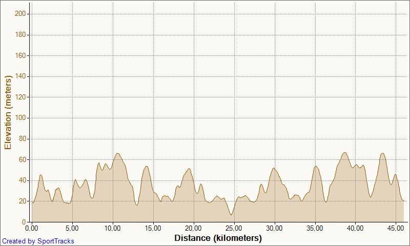 Løypeprofil for sykkeldelen av Bergen Triathlon 2010